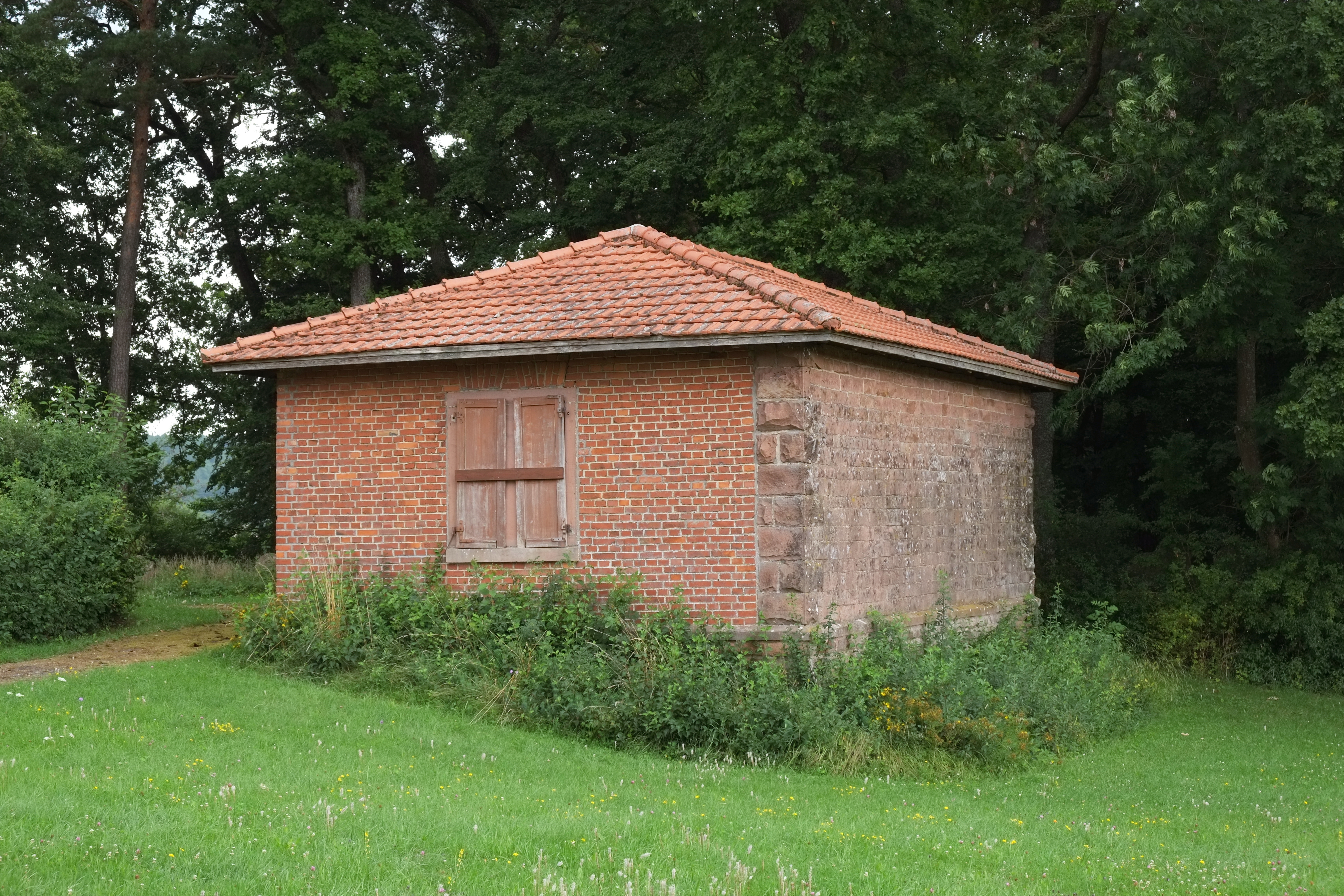 Jüdischer Friedhof in Bödigheim, einem Stadtteil von Buchen im Neckar-Odenwald-Kreis (Baden-Württemberg, Deutschland)